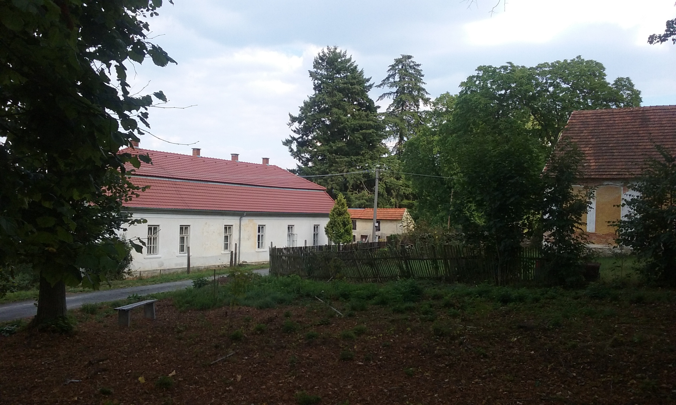 Statek v Pušperku. Okres Klatovy, Česká republika.